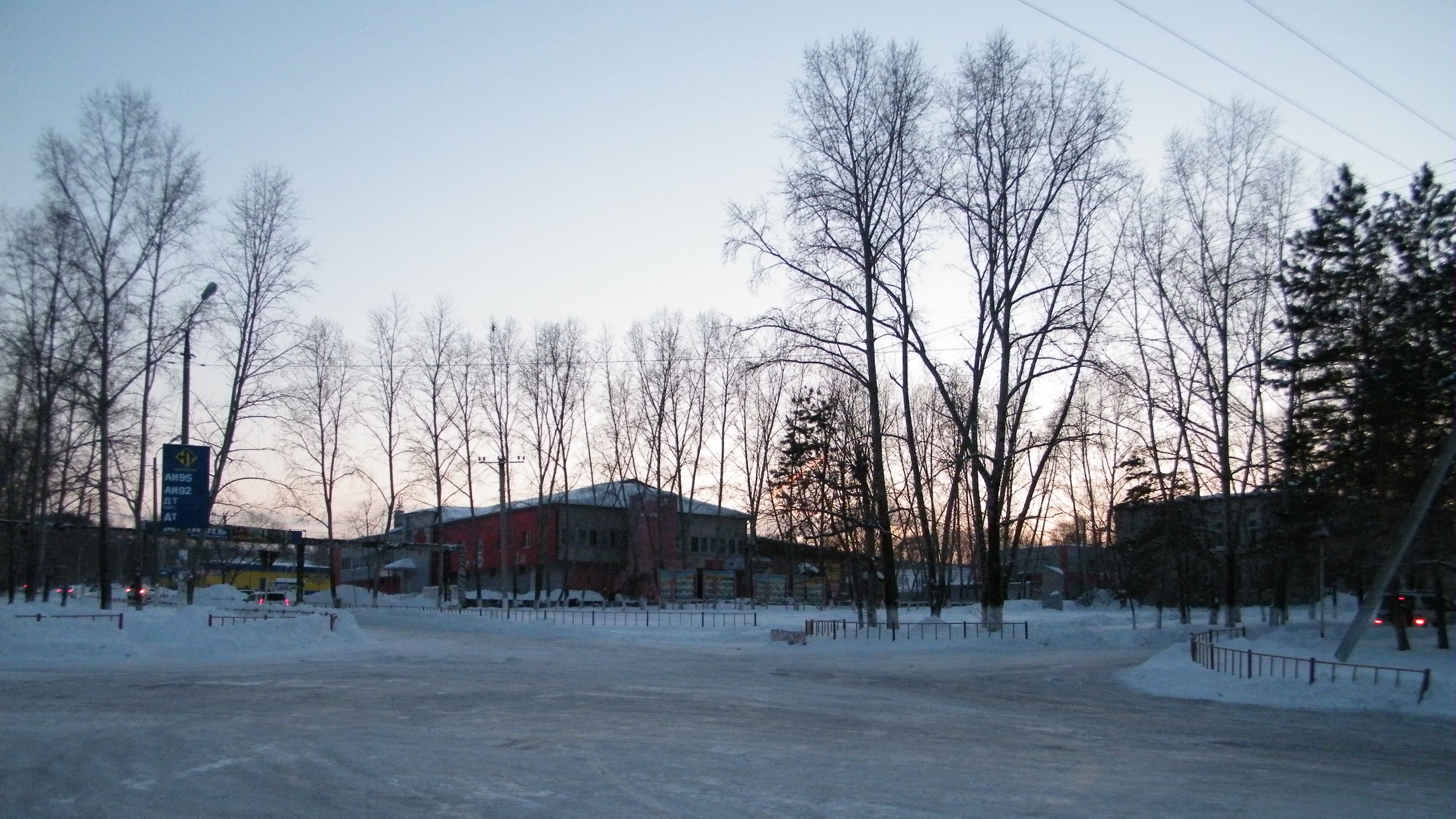 Село Некрасовка Хабаровский край